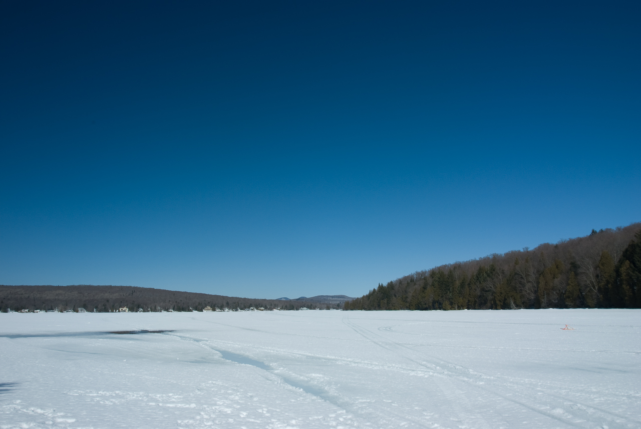 Le lac St-Joseph